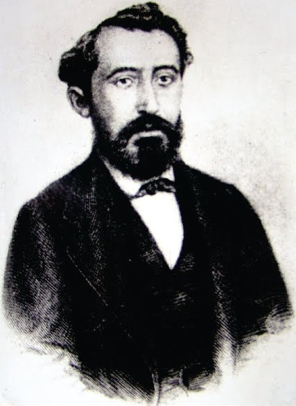 Depicted person: Juvenal Galeno